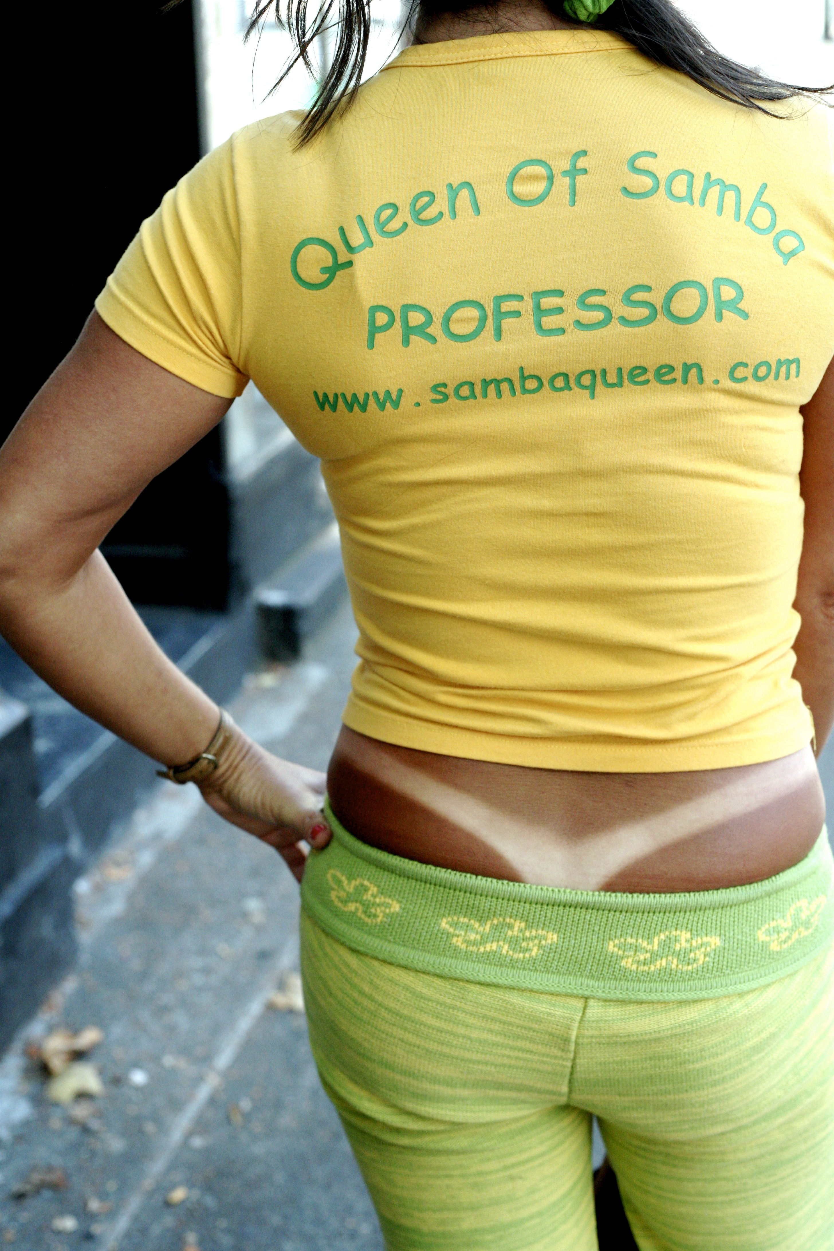 Tanline T-Bone. [1]